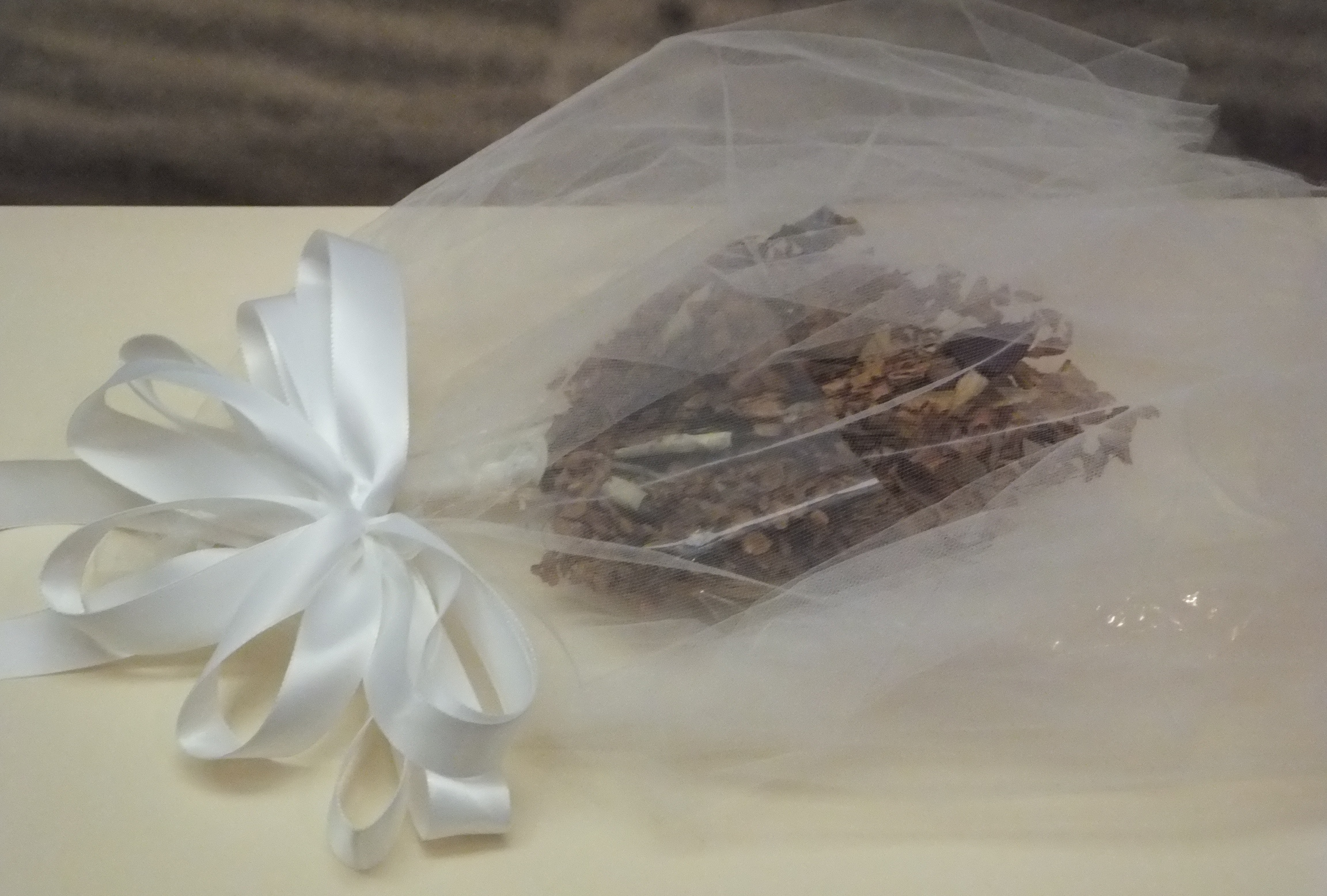 සිංහල: විවාහ මංගල්‍යයෙන් පසුව වියලා සංරක්‍ෂණය කල රොනල්ඩ් සහ නැන්සි රේගන් යුවලගේ විවාහ මල් කළඹ